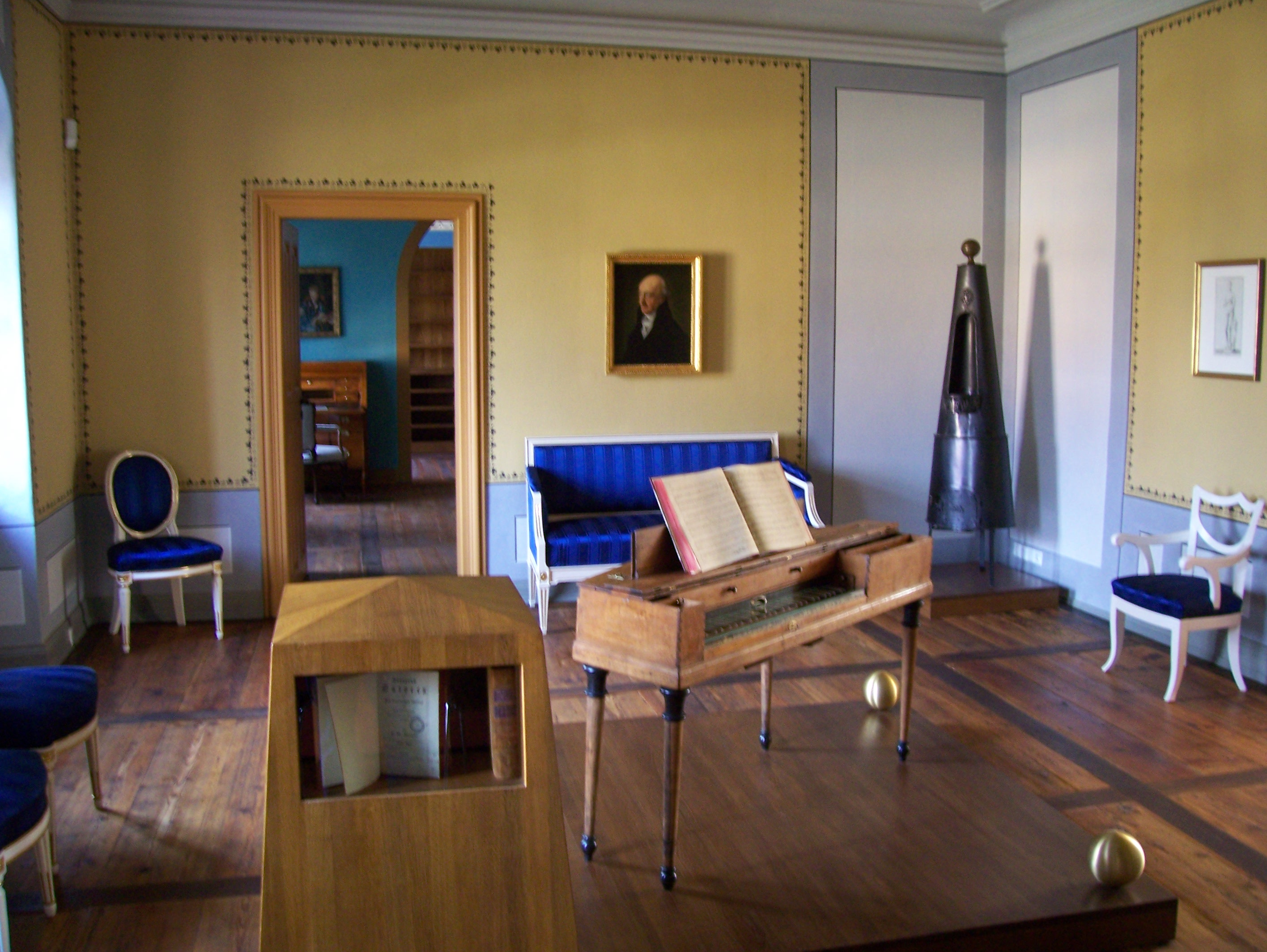 Im Wieland-Museum in Oßmannstedt (Deutschland).